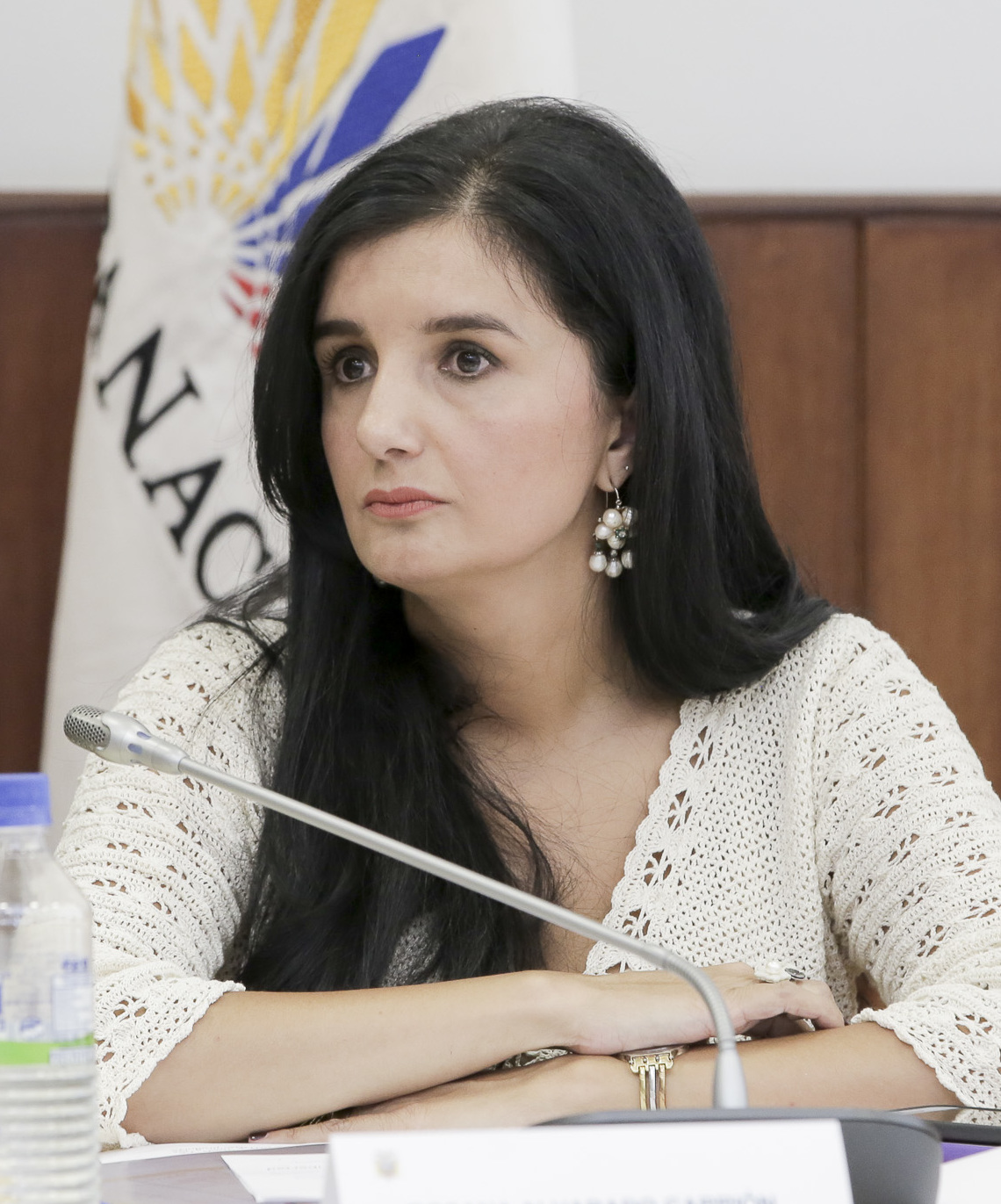 20 de septiembre de 2017 - Comisión de Juticia Tema: 1. Rosana Alvarado Carrión, ministra de Justicia, Derechos Humanos y Cultos, para que informe sobre los hechos relacionados con las personas privadas de la libertad del Centro de Rehabilitación Social Turi, en Cuenca, Azuay; y del hacinamiento en los centros de rehabilitación del país 2. Fernando Valdez Aigaje, presidente de la Unión Nacional de Operadores de Transporte Comercial de Pasajeros en Taxi con Servicio Ejecutivo del Ecuador (UNATEC), respecto de las reformas al Código Orgánico Integral Penal. Fotografía: Alberto Romo/Asamblea Nacional